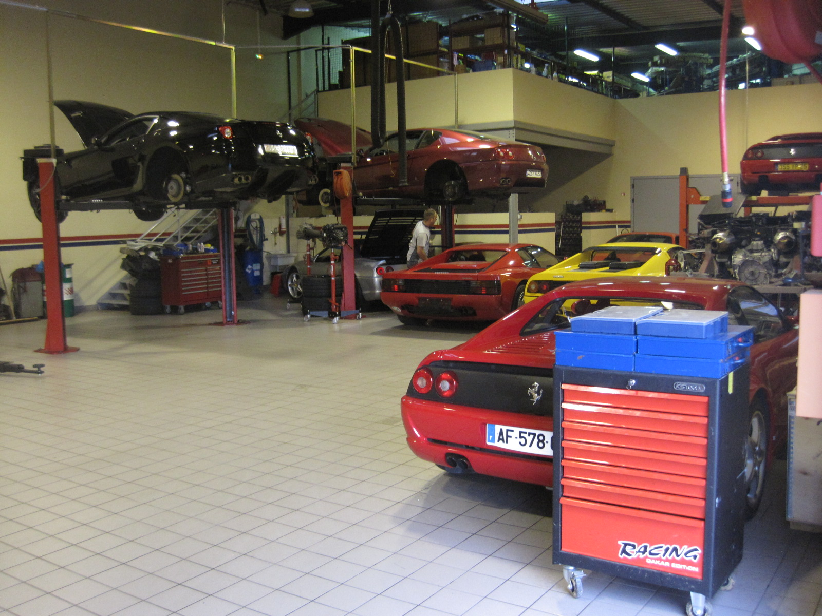 Ferrari Testarossa